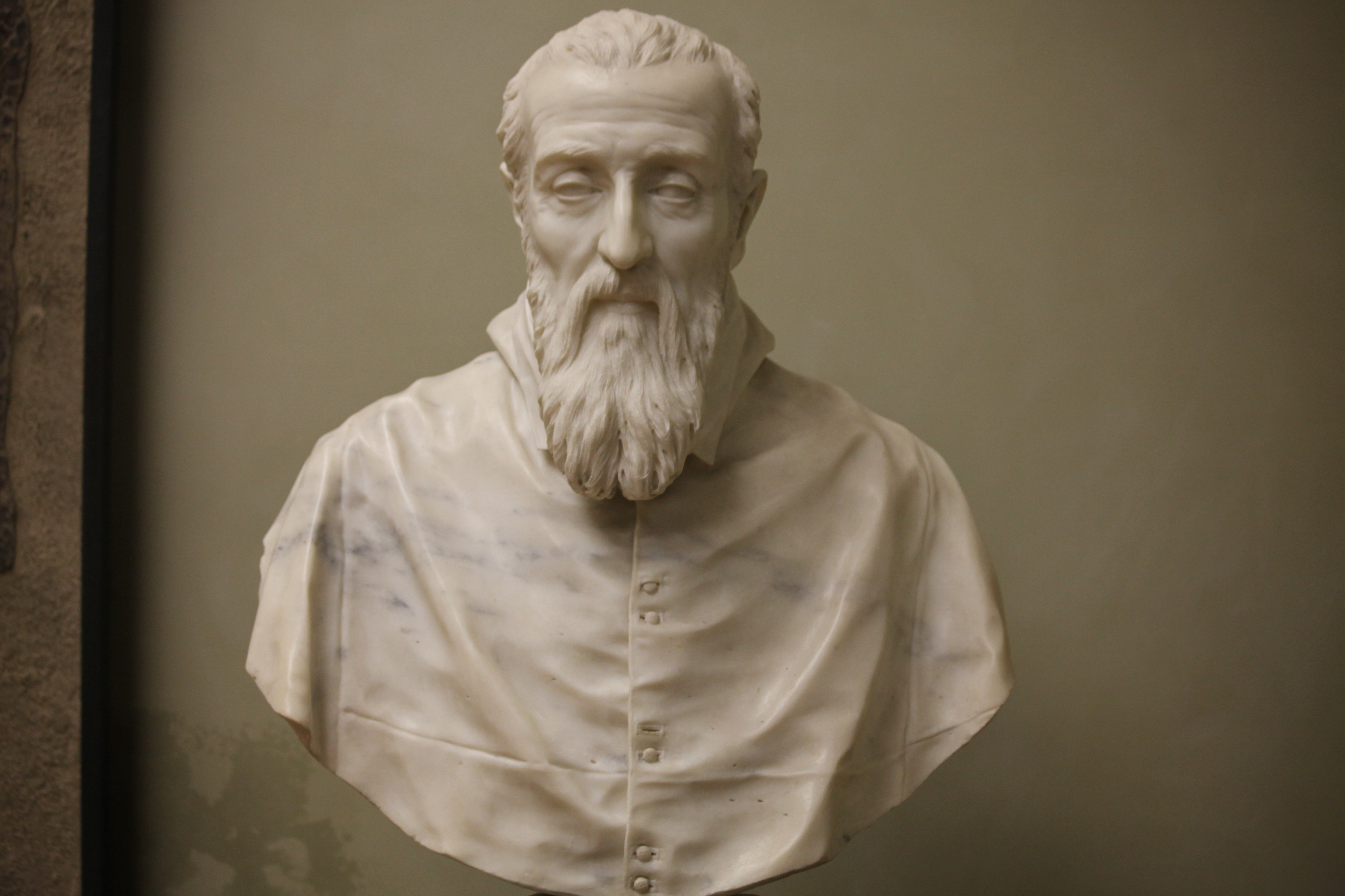 Galleria G. Franchetti alla Ca' d'Oro - MIBAC This is a photo of a monument which is part of cultural heritage of Italy.